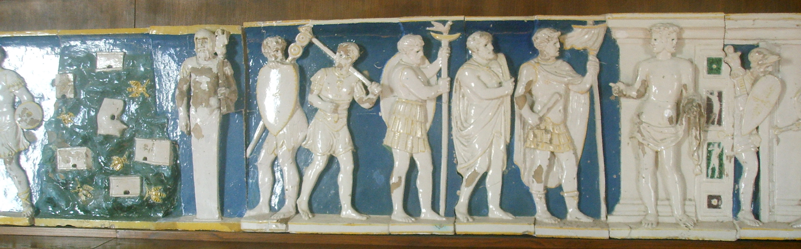 Villa medicea di Poggio a Caiano, inside Fregio (taken from outside) bu Andrea Sansovino in Poggio a Caiano, Italy